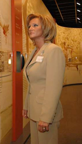 Radulovics Bojana sportcsillagok díjazása (SportStar Awards) keretében, a lausanne-i Olimpiai Múzeumban 2004